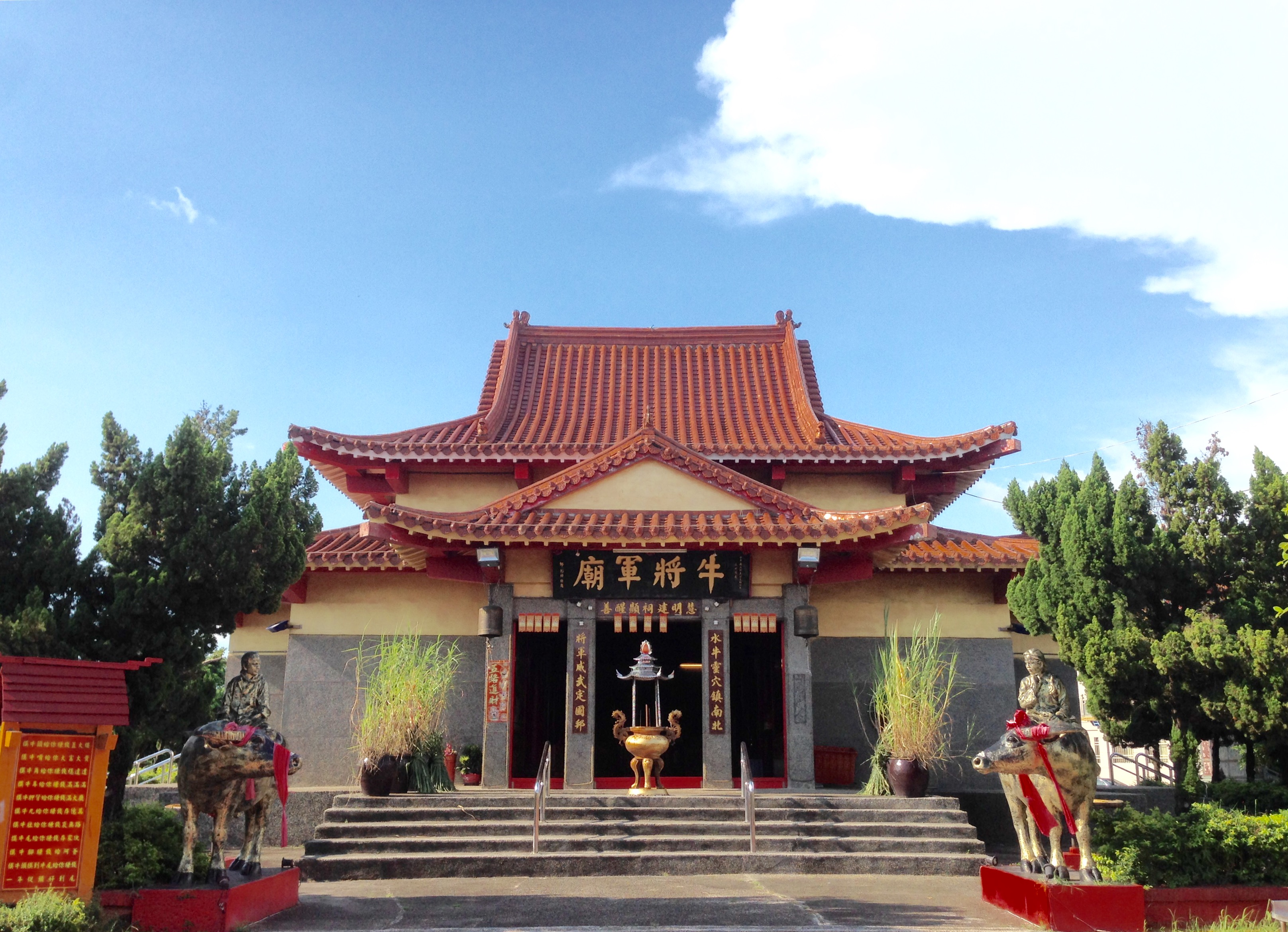 中文（台灣）: 太保牛將軍廟